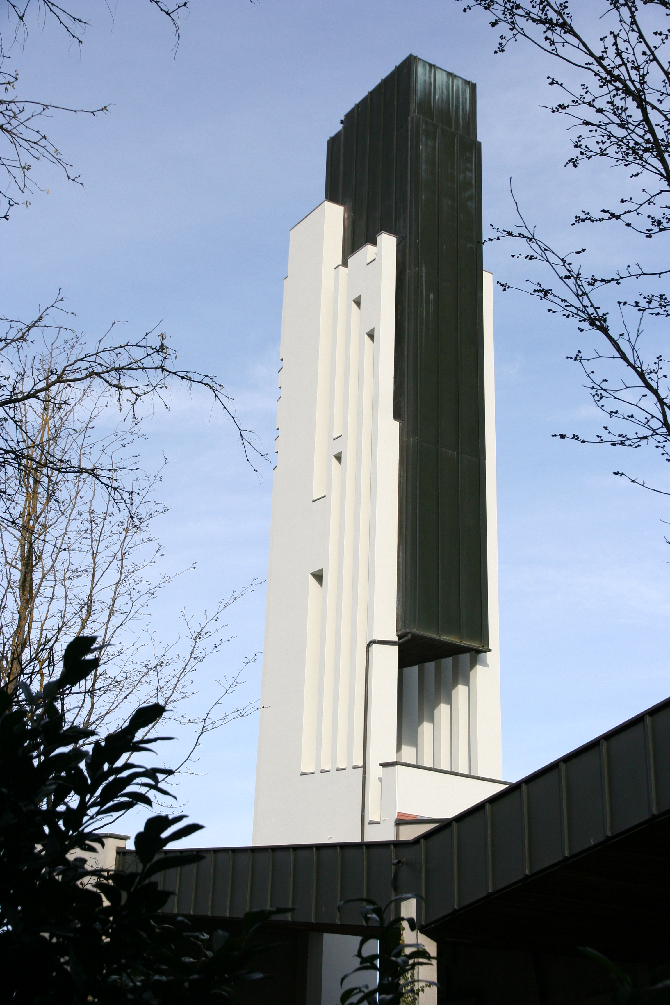 Römisch-katholische Pfarrkirche Herz Jesu in Buchs SG, erbaut von Justus Dahinden